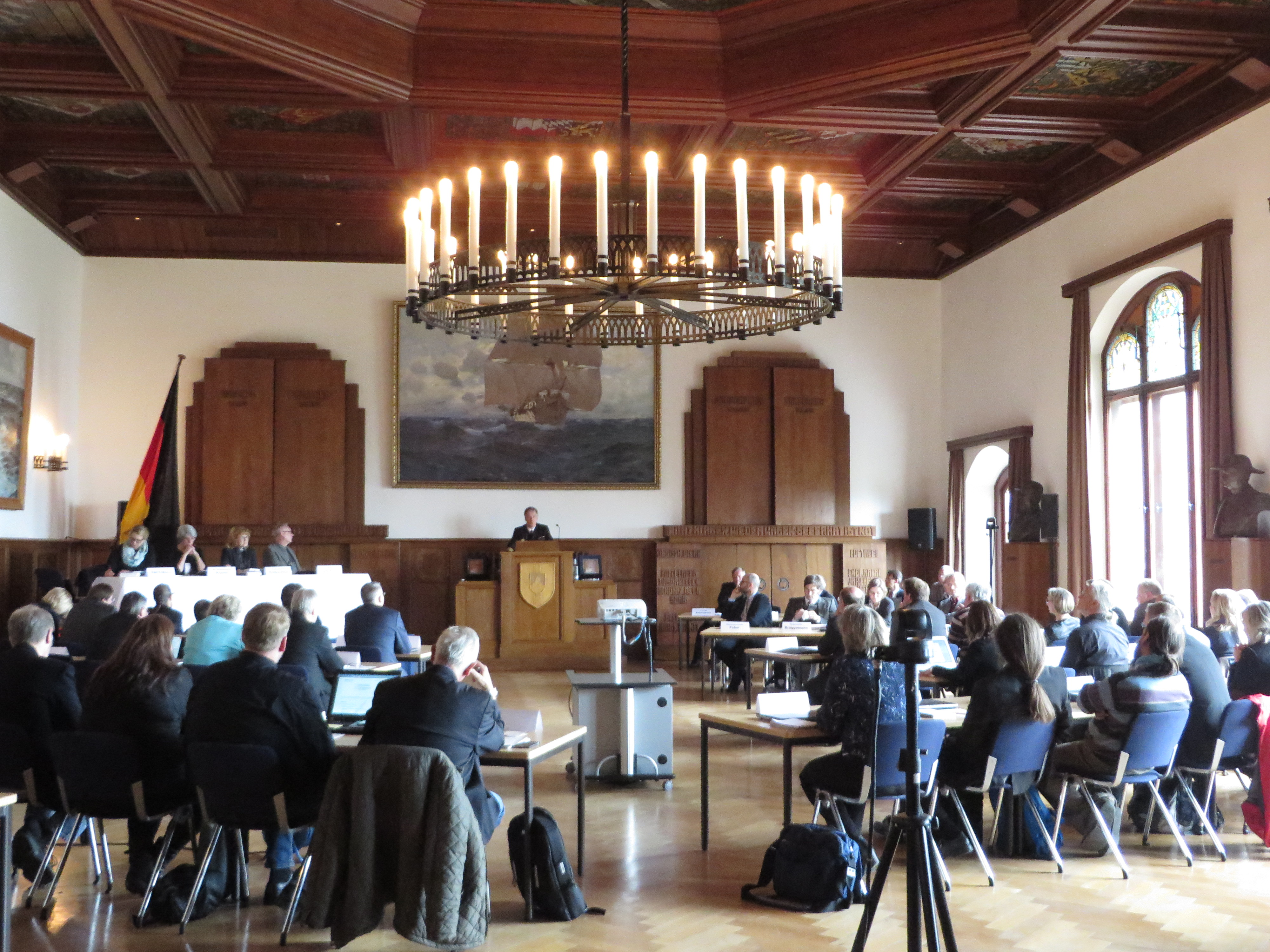 Flensburger Ratsversammlung, 7. Mai 2015, MSM-Aula, Begrüßung, Öffentlicher Teil, Bild 03